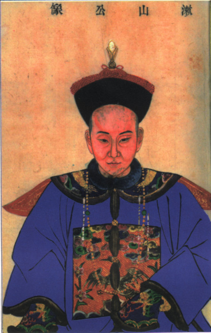 郁昆（？年－？年），字漱石，江苏上海县（今属上海市）人。晚清探花、政治人物。